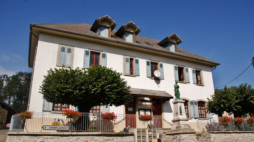 La Mairie